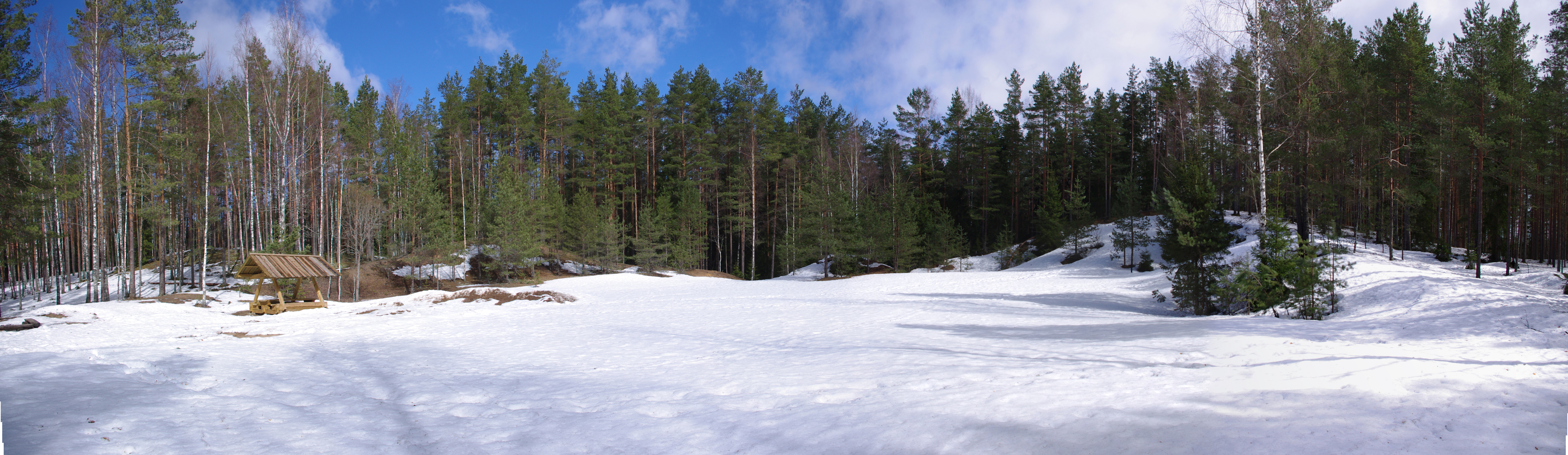 Soomaa rahvuspark, metskond nr. 7, Ruunaraipe luited.